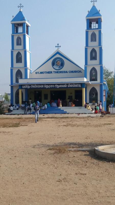 மீனம்பட்டியில் உள்ள அன்னை தெரெசா ஆலயம்